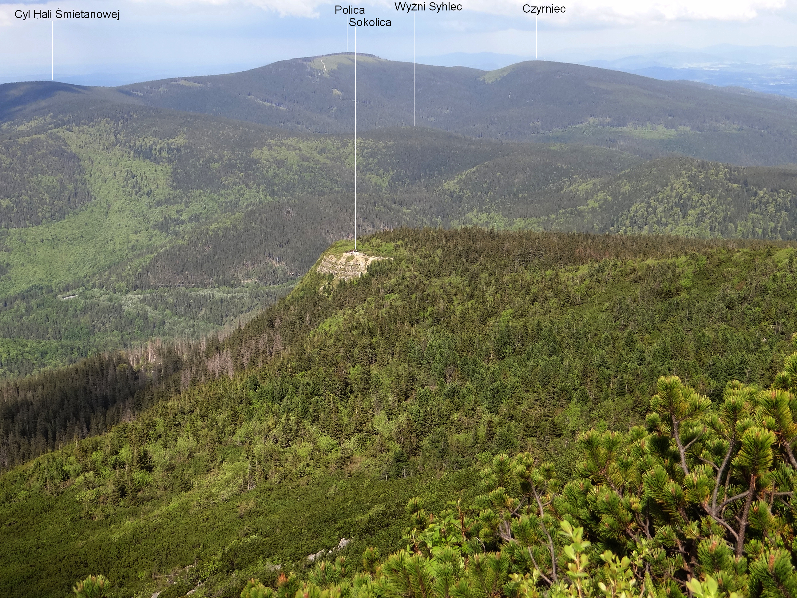 Widok z północno-wschodniego grzbietu Babiej Góry